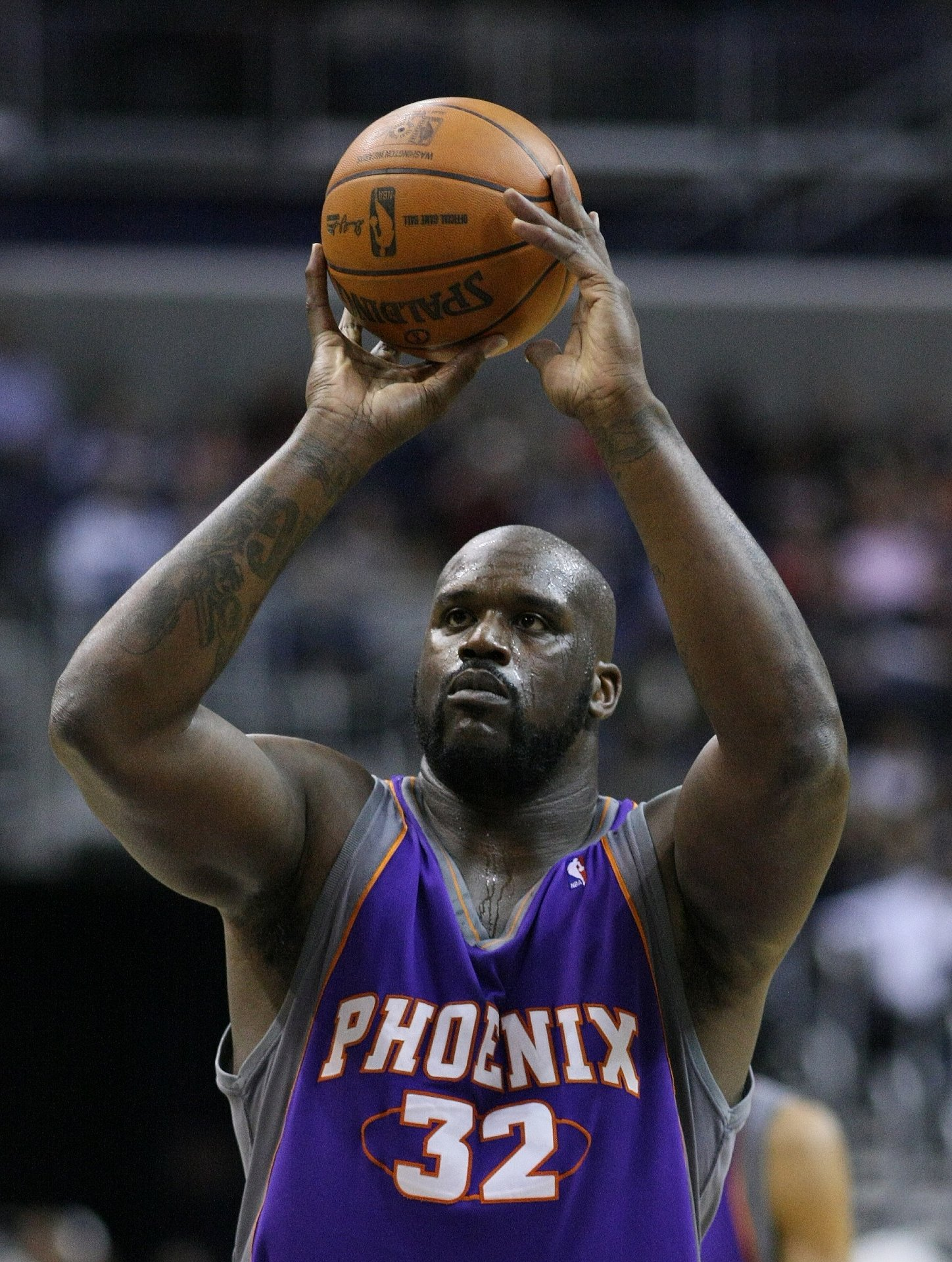 Shaquille O'Neal realizando un tiro libre.